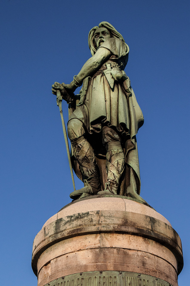 Si l'initiative d'élever la statue revient bien à Napoléon III en personne, preuve a pu être faite enfin que le coût de l'opération n'a pas été imputé sur sa cassette personnelle malgré la rumeur propagée dès l'époque par des courtisans zélés. Le dossier conservé aux Archives Nationales révèle qu'elle a été payée par le secrétariat d’État chargé des Beaux-Arts, lequel a suivi toutes les étapes de son élaboration, depuis l'arrêté signé le 2 juillet 1862 autorisant sa commande jusqu'à son installation le 27 août 1865.